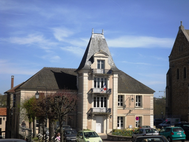 Hôtel de ville de Longpont-sur-Orge